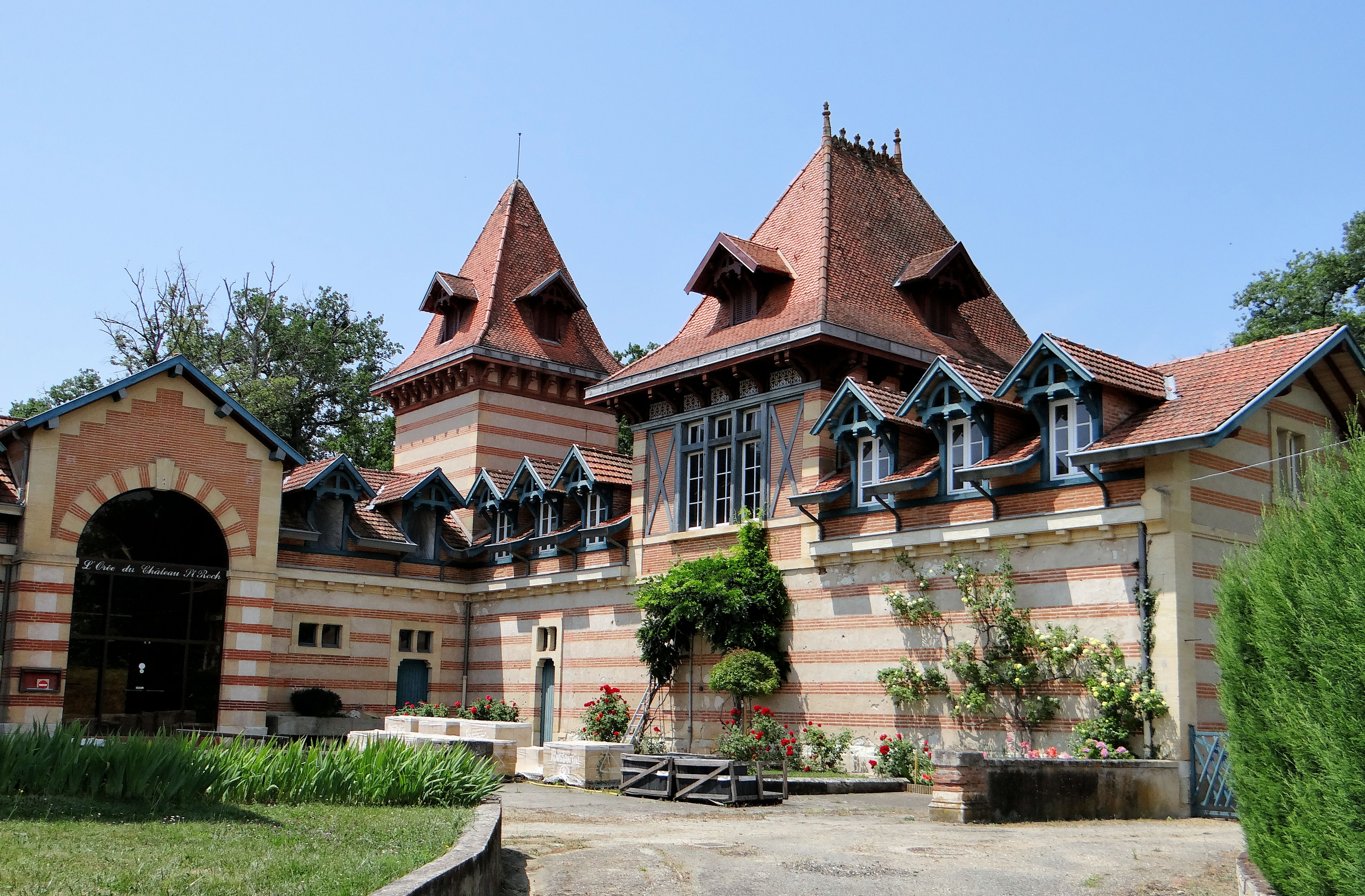 Le Pin - Château Saint-Roch - Communs